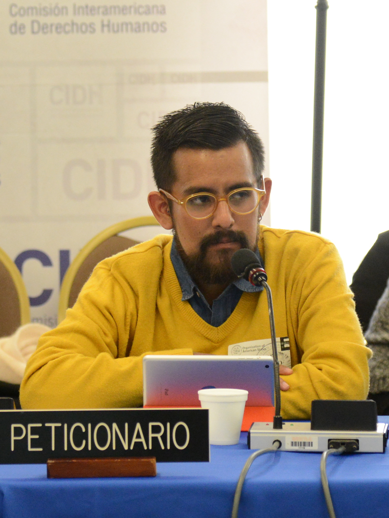 Giovanny Romero Infante en 2015